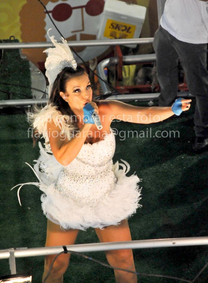 Ivete Sangalo no Carnaval 2010.